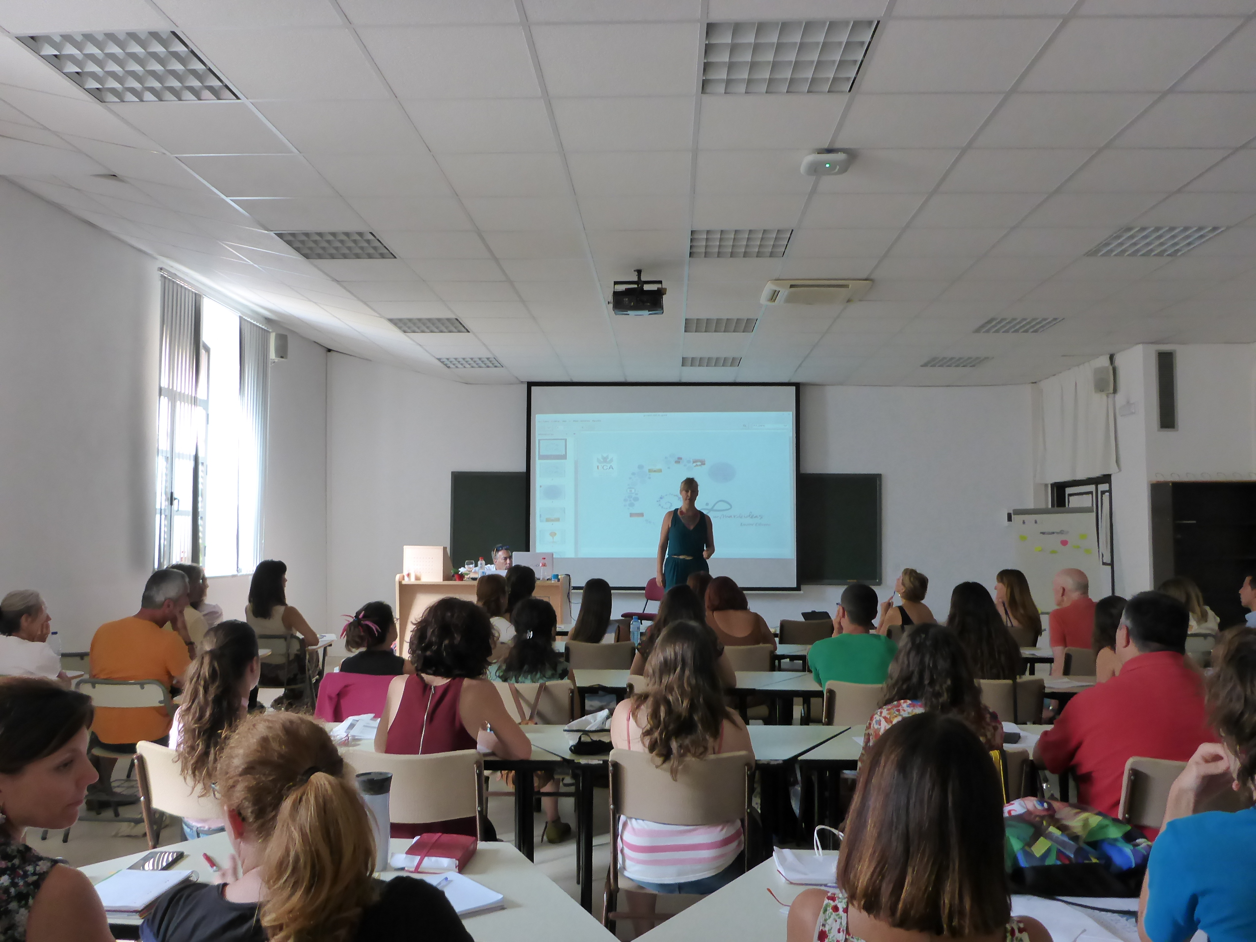 Ponencia de Desiré Oliveros en el Curso Mindfulness: personas, educación y empresas hacia una vida consciente